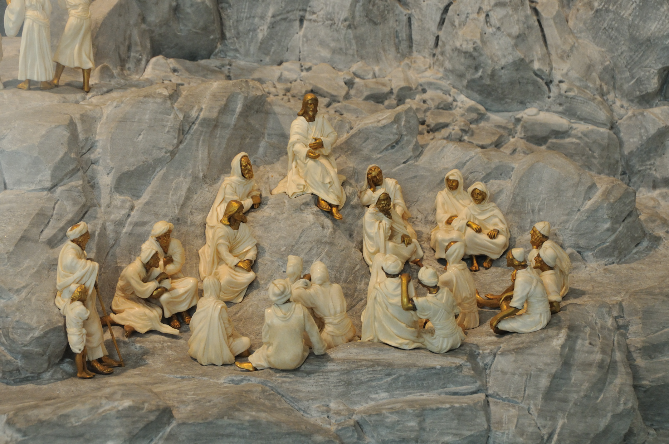 Via Vitae (« Chemin de Vie »), chef d'œuvre de l'orfèvre et joailler parisien Joseph Chaumet (1852-1928) représentant les principales scènes de la vie de Jésus, musée eucharistique du Hiéron, Paray-le-Monial, Saône-et-Loire, France Détail : Le Sermon sur la montagne